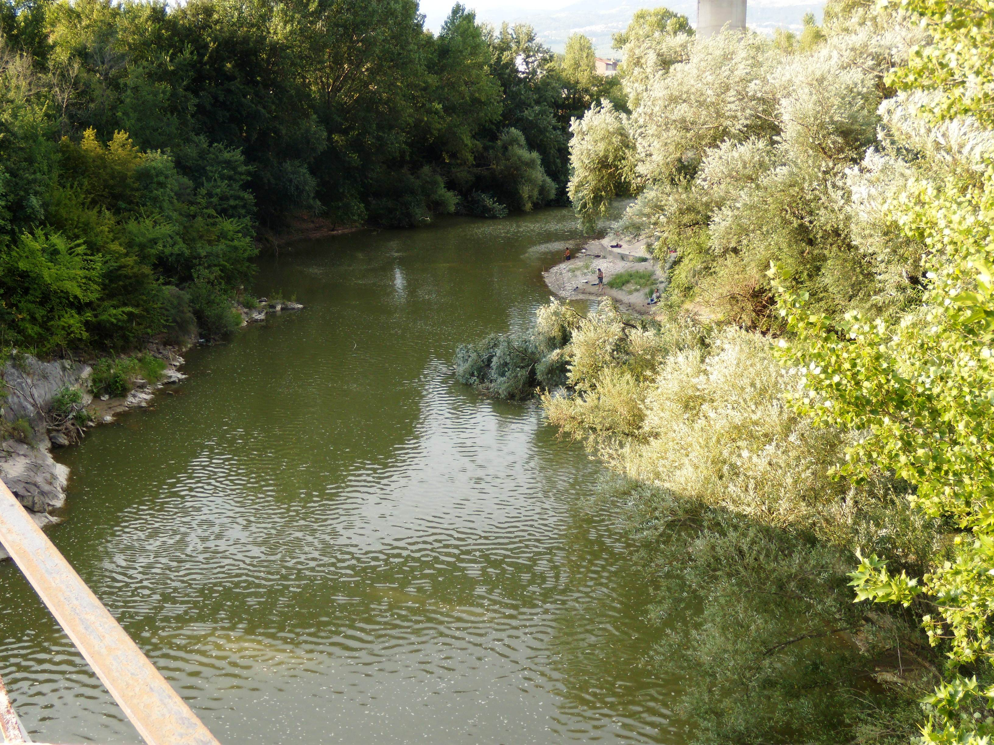 Scorcio del fiume Calore dal ponte Maria Cristina a Solopaca (Bn-Italia).